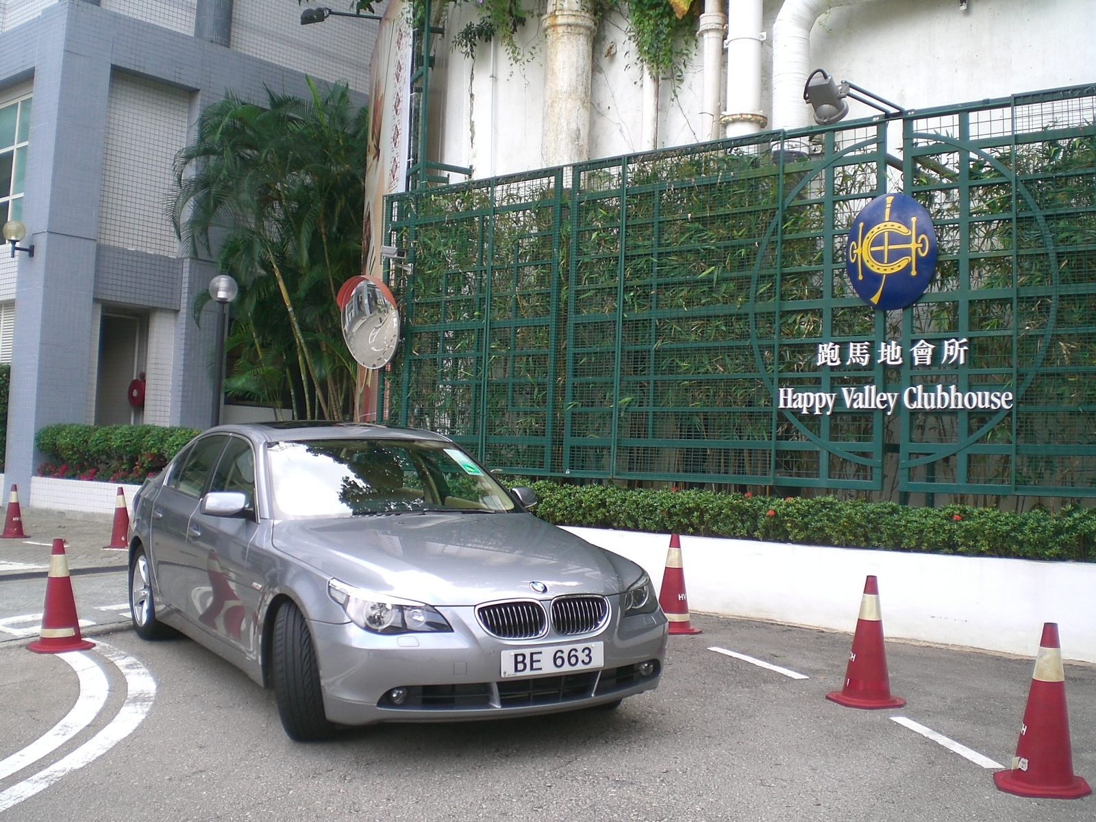 香港賽馬會跑馬地會所位於zh:跑馬地山光道